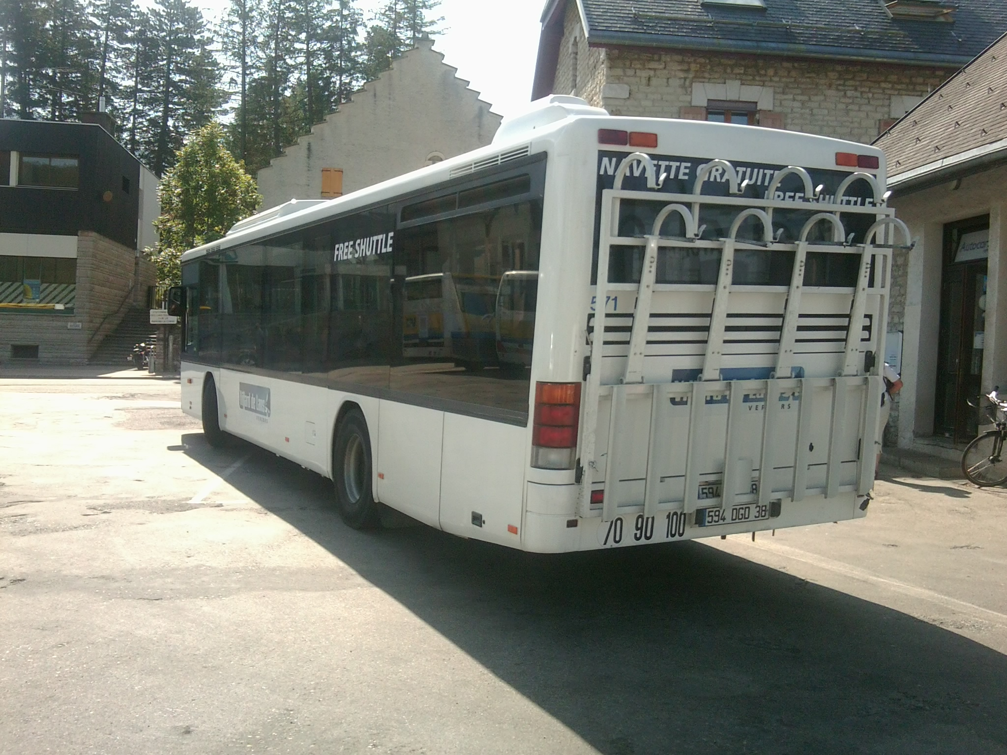 Villard-de-Lans (38) : La navette gratuite, à la gare routière.